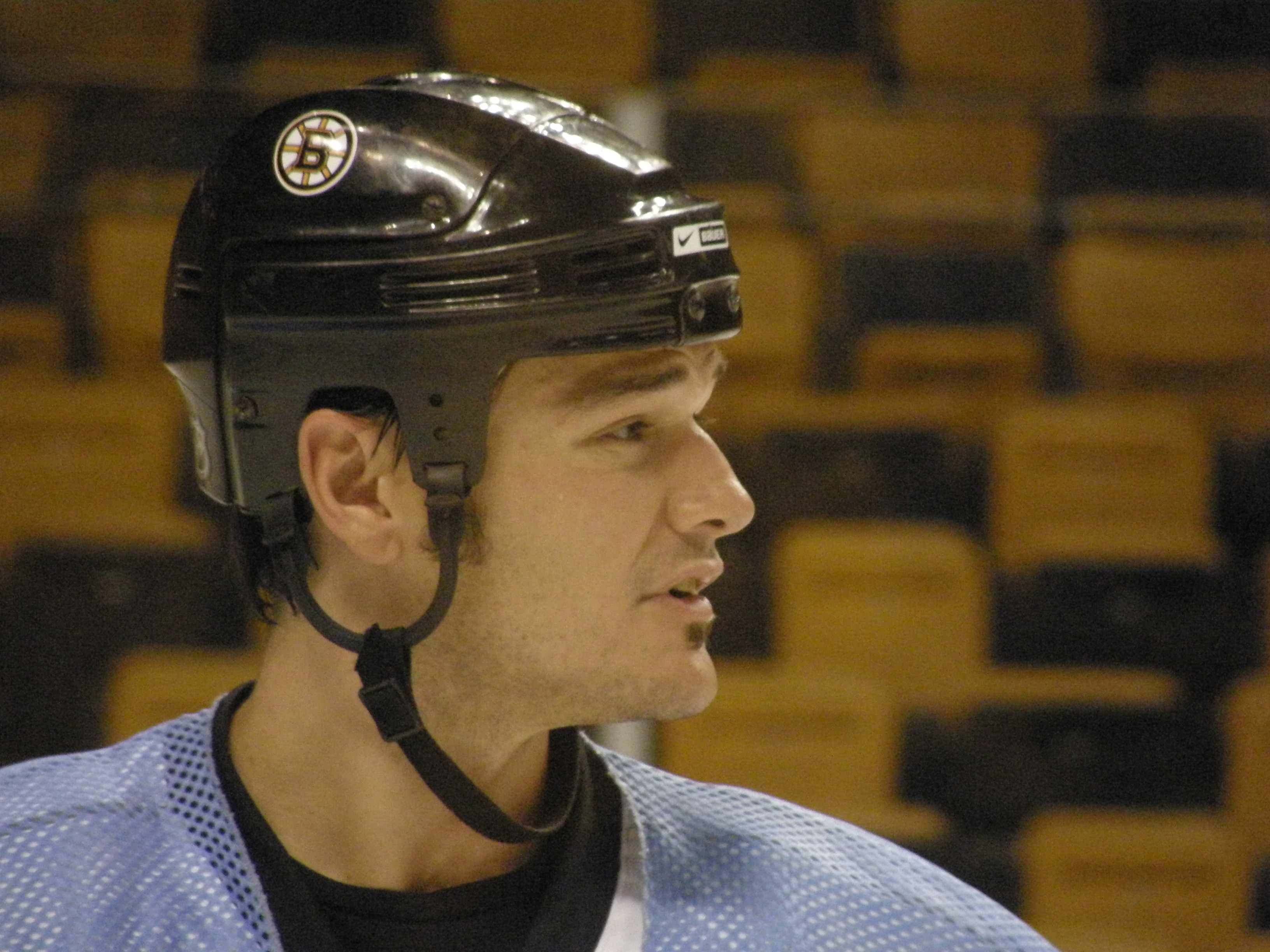 #27 Peter Schaefer (LW)